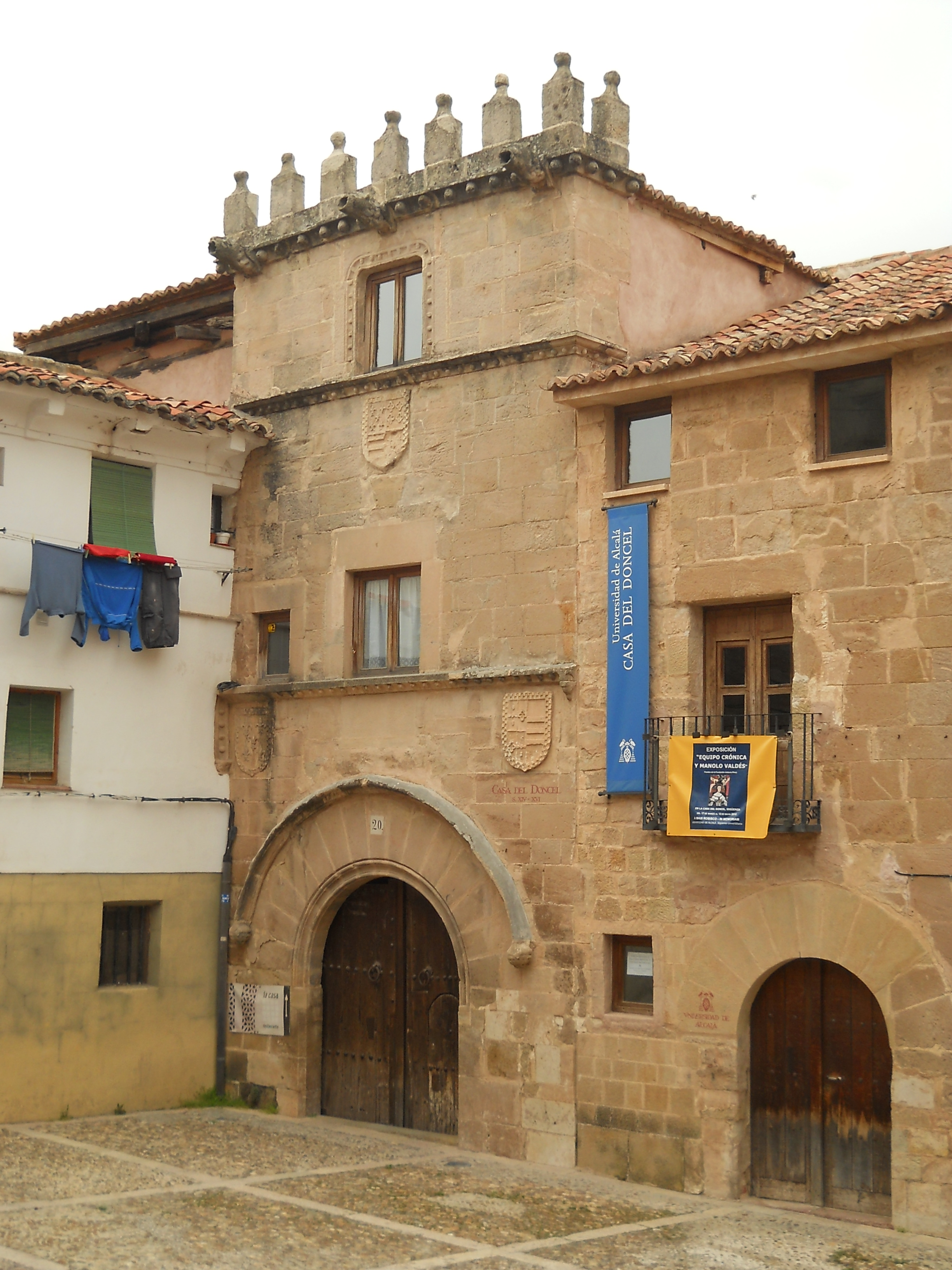 Casa del Doncel, Sigüenza, Guadalajara, España